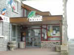 La mairie de Plestan